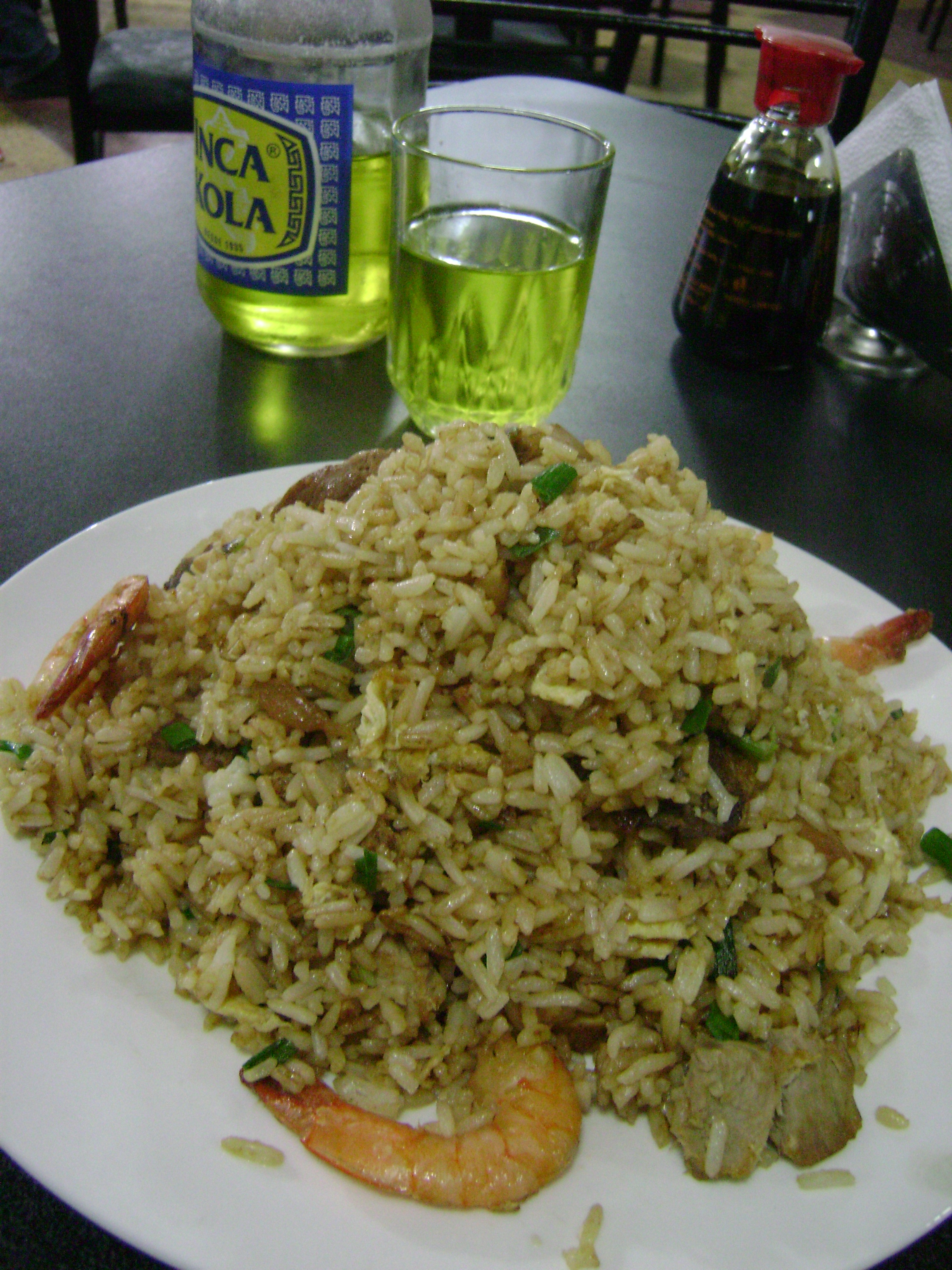 Chaufa especial, acompañado de una Inca Kola "gordita". chifa Xiumin. Huaraz, Ancash. Perú.